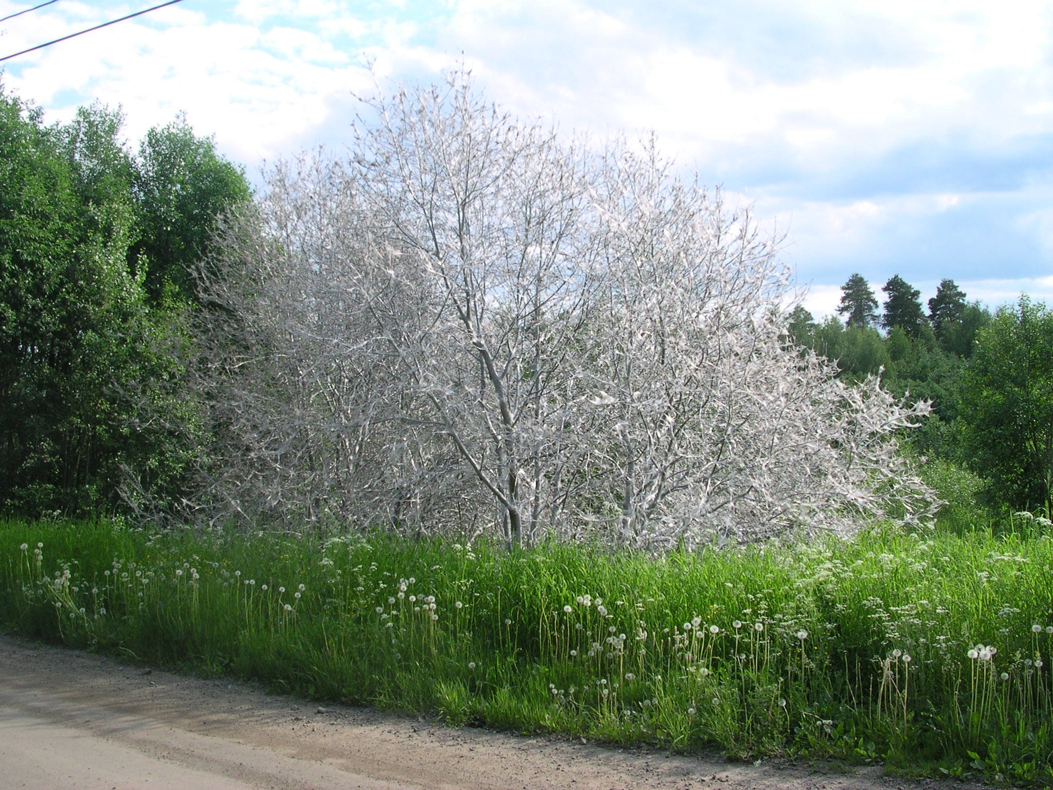 Yponomeuta evonymella